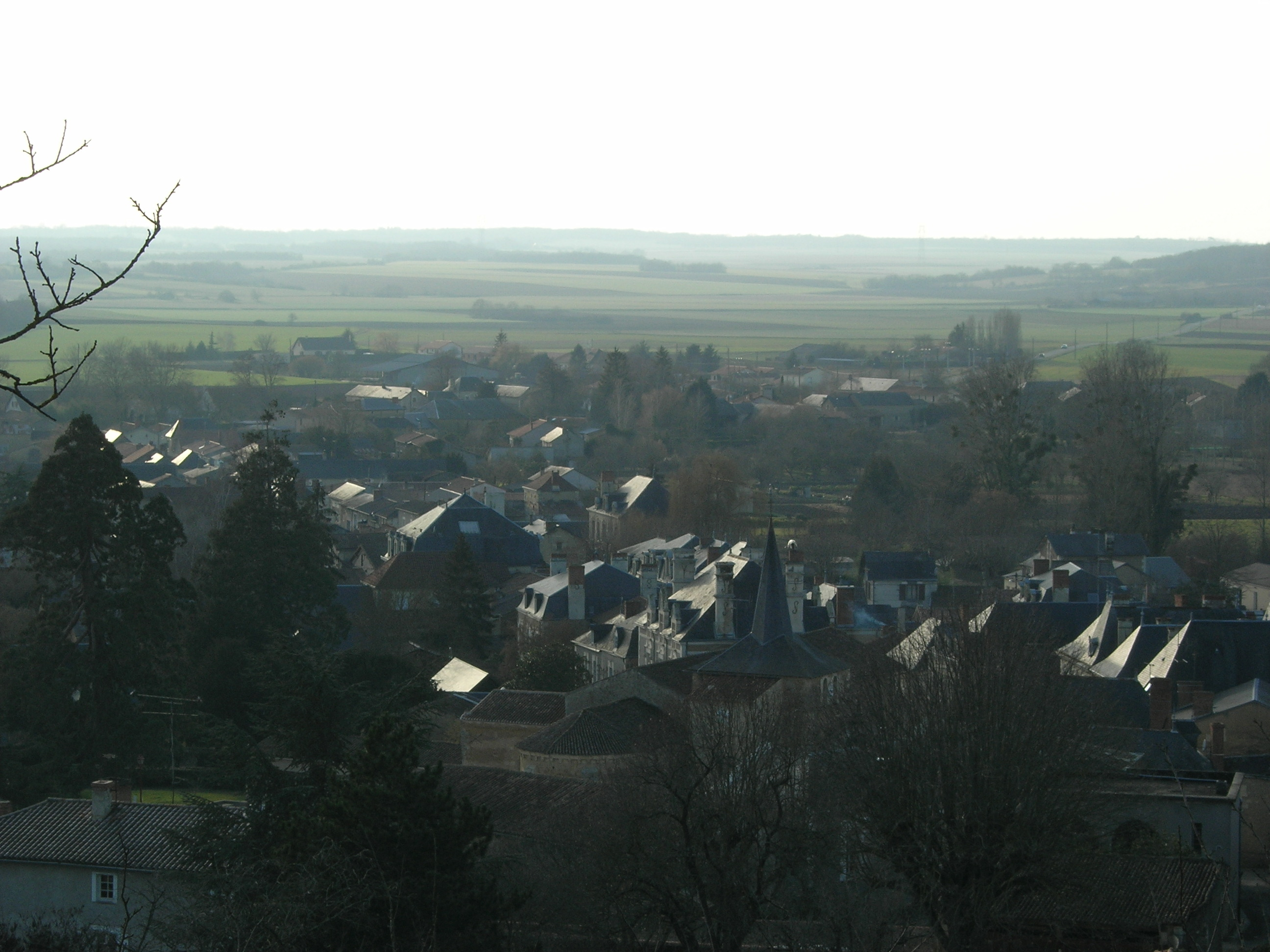 Description =Le village de Moncontour Source =Photo taken by Remi Jouan Date =Février 2006 Author =Remi Jouan